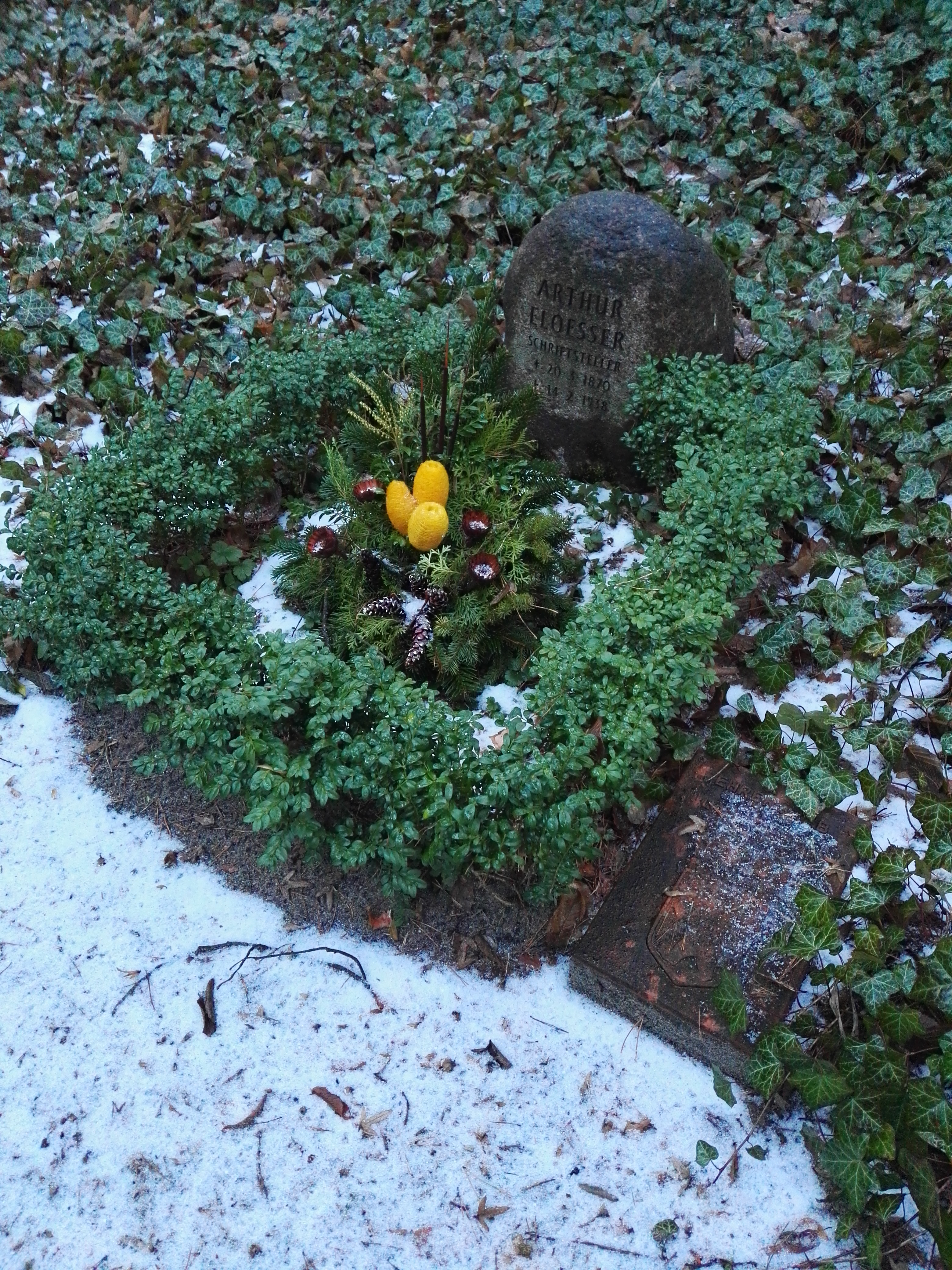 Grab von Arthur Eloesser auf dem Wilmersdorfer Waldfriedhof Stahnsdorf; Ehrengrab der Stadt Berlin